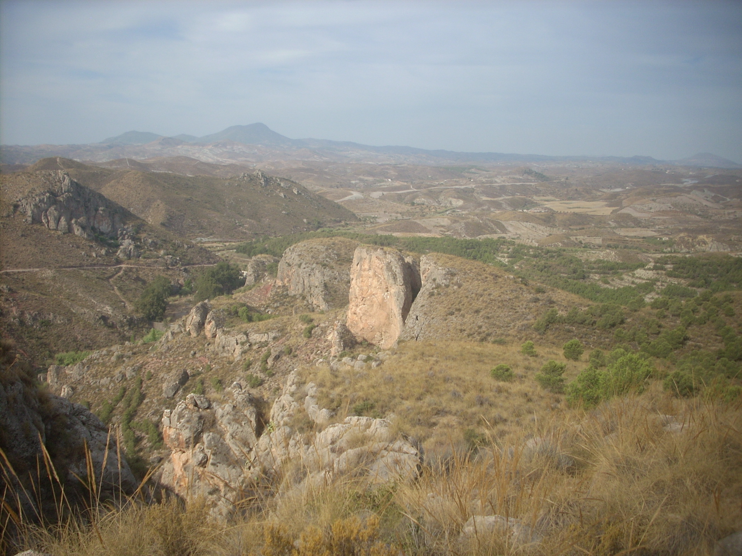 Vista de uno de los sectores del yacimiento arqueológico de Peñas de Béjar